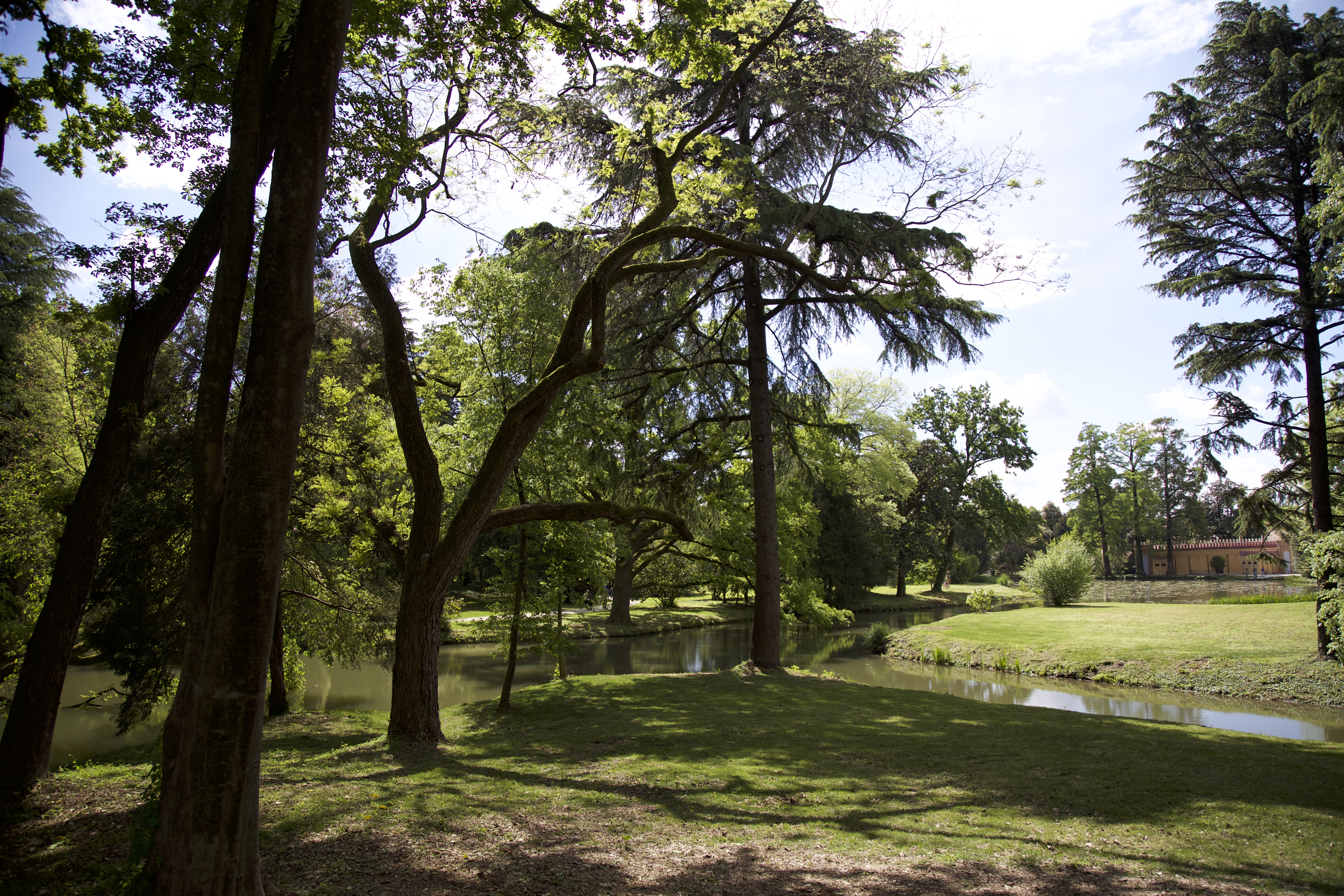 Scorcio del Parco della Villa. 25 aprile 2016